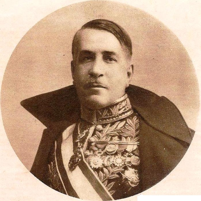 D. Emilio Rodríguez Mendoza, embajador de Chile - 1930. Emilio Rodríguez Mendoza (Valparaíso, 4 de mayo de 1873-Santiago, 11 de diciembre de 1960) fue un escritor, periodista, diplomático y político chileno.